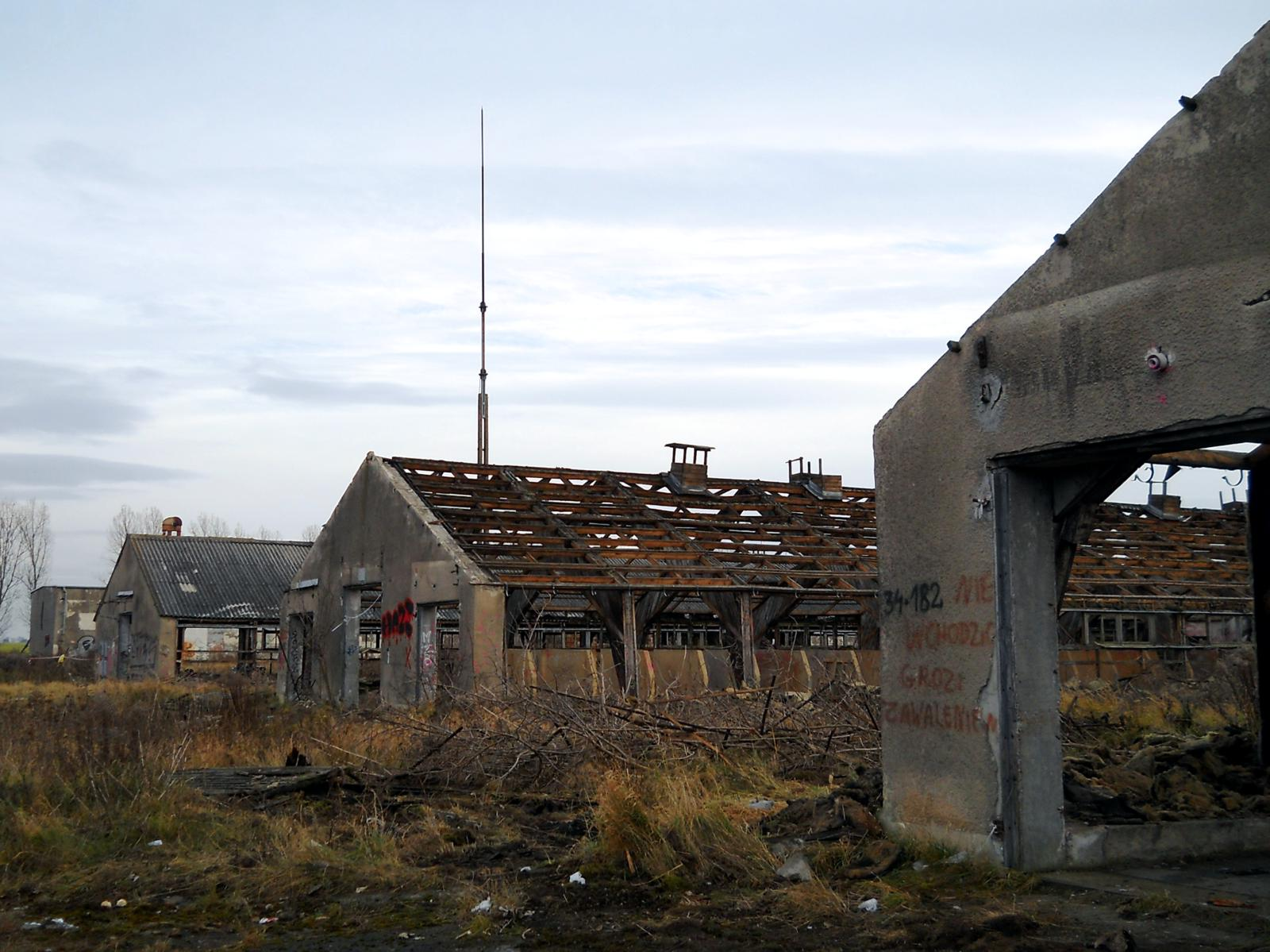 Wojcieszyce. Rozbiórka budynków dawnej farmy SHR.